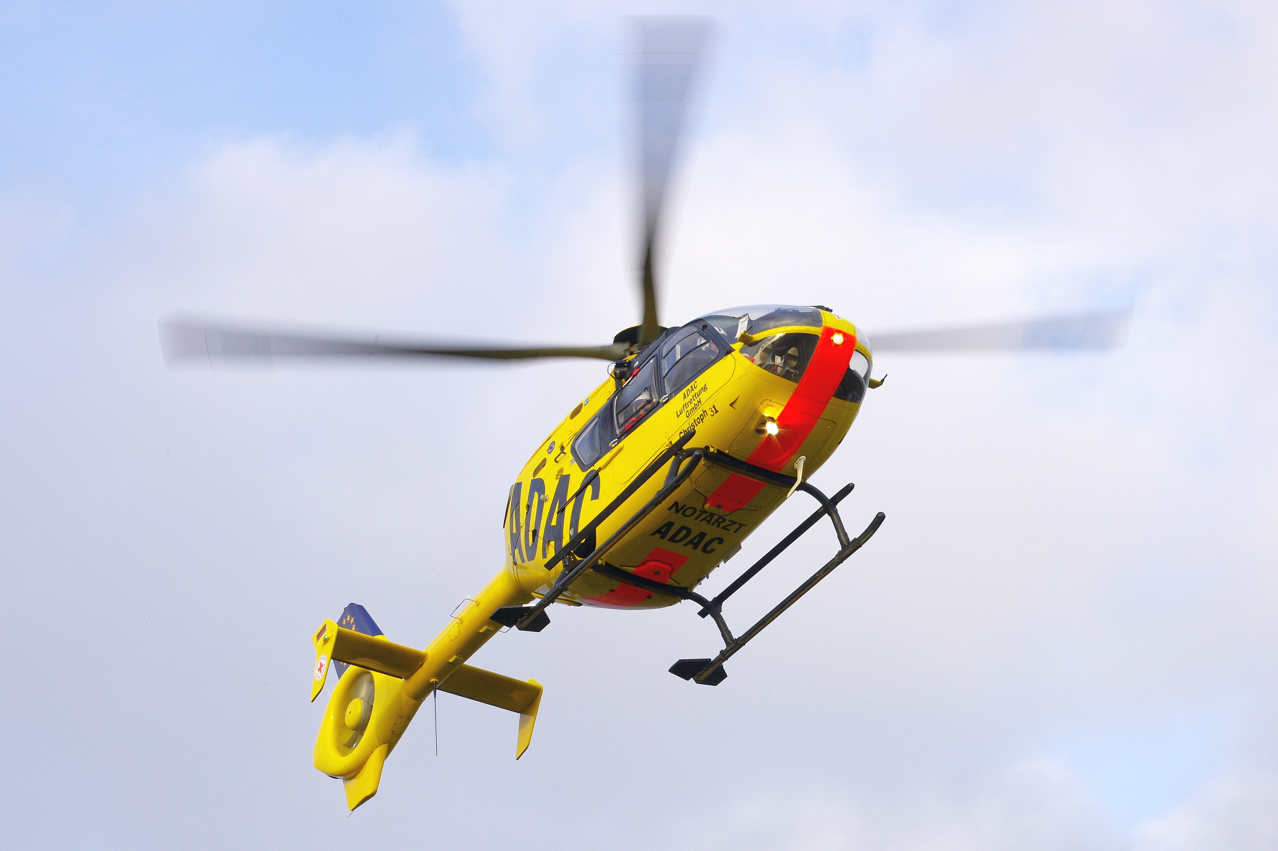 Rettungshubschrauber Christoph 31 (Berlin) im Notarzt-Einsatz